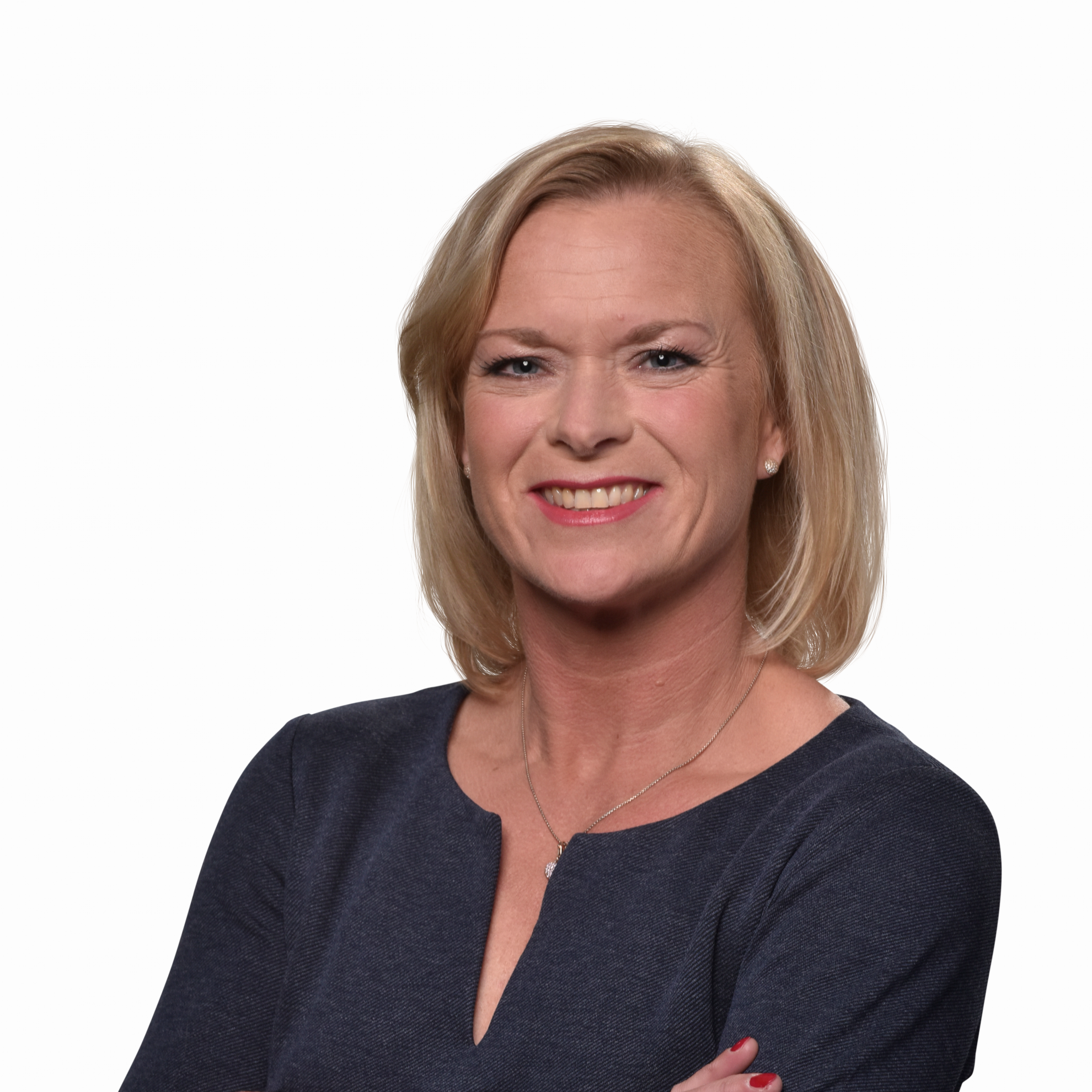 Dunja Kreiser MdL, Landtagsabgeordnete Wahlkreis 9 Niedersachsen, Deutschland